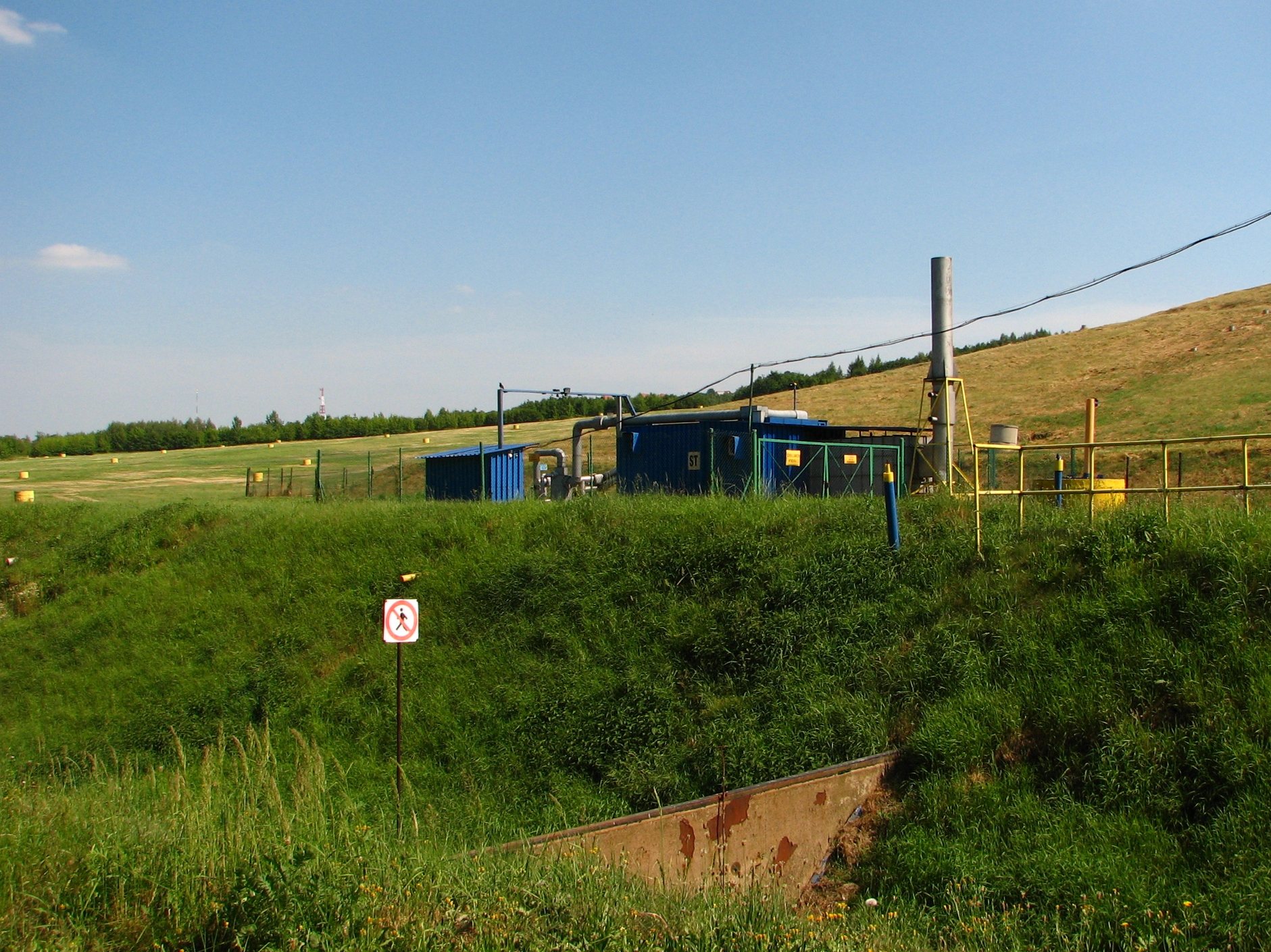 Teren składowiska odpadów komunalnych Barycz w Krakowie-Baryczy.